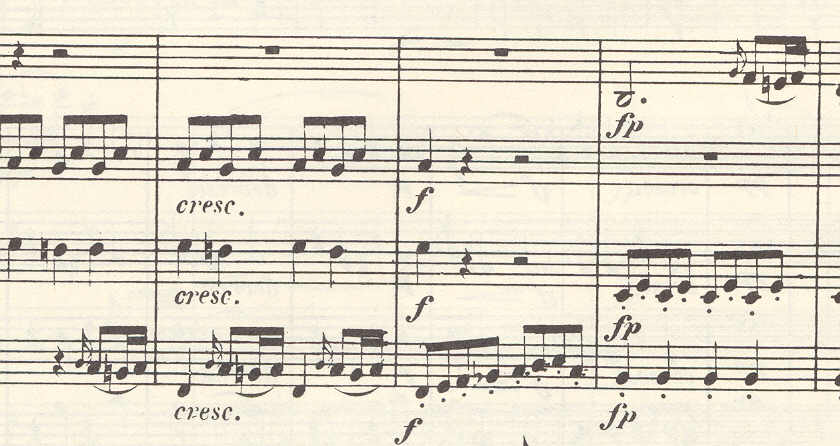 Strijkkw 6 Beethoven 4e deel 2e_thema_in_cello